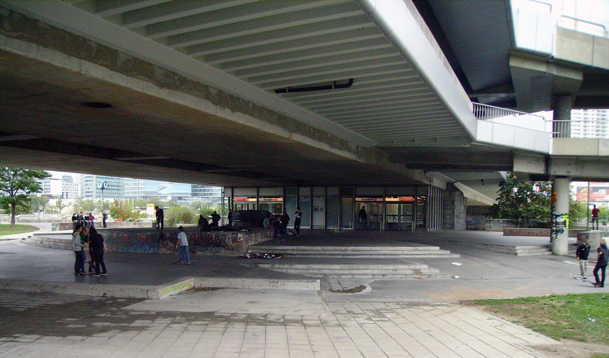 Reichsbruecke, Subway-Station under the bridge "Reichsbrücke" in Vienna